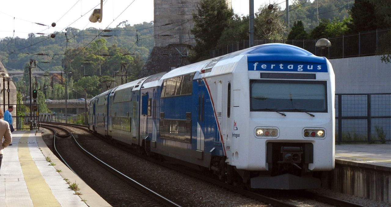 UQE 35?? procedente de Setúbal